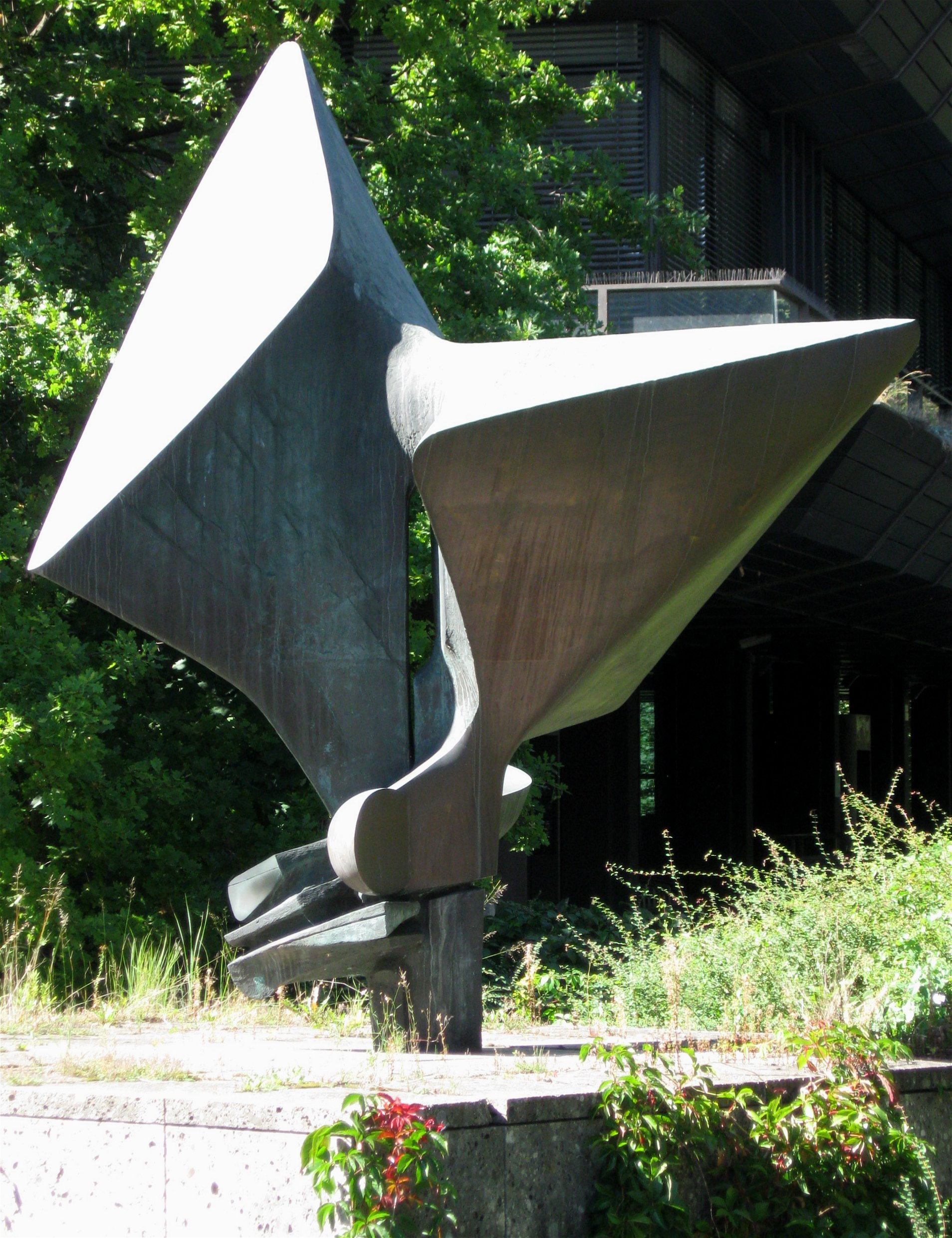 Bernhard Heiliger: Zeichen 74, Bronze, 1974, Tucherpark, München